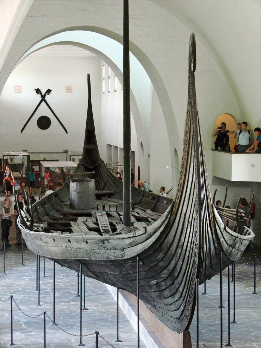 Le bateau d'Oseberg dans le musée des Bateaux vikings à Oslo (Vikingskipshuset). Ce bateau, mis au jour en 1904, a été construit entre 815 et 820 et a été utilisé comme bateau funéraire pour une femme de haut rang qui est morte en 834. Le corps se trouvait dans une chambre funéraire en bois placée sur le pont. Autour du corps ont été découverts de nombreux objets en bois, cuir et textiles. Le bateau, long de 22 m, est en bois de chêne. Il comportait 30 rameurs et n'était pas un bateau construit pour la haute mer. Le musée présente trois bateaux vikings, très bien conservés, ainsi que des objets, qui ont été découverts dans trois tertres funéraires près du fjord d'Oslo.